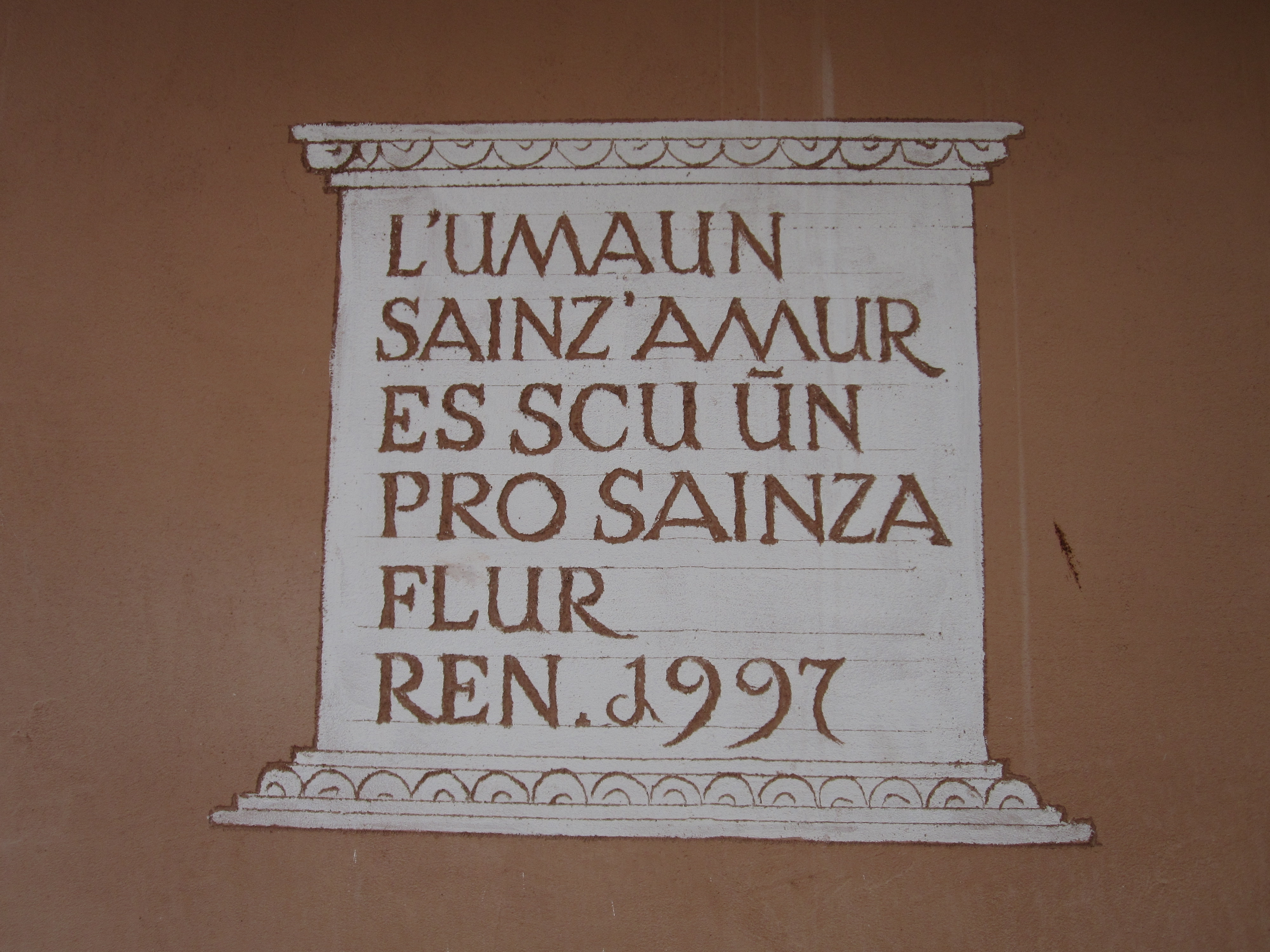 Sgraffito auf Puter (Oberengadinisches Romanisch) auf einer Hausfassade in Samedan